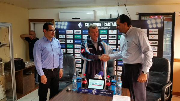 Cesar Eduardo Mendez presentado en Cartagines.